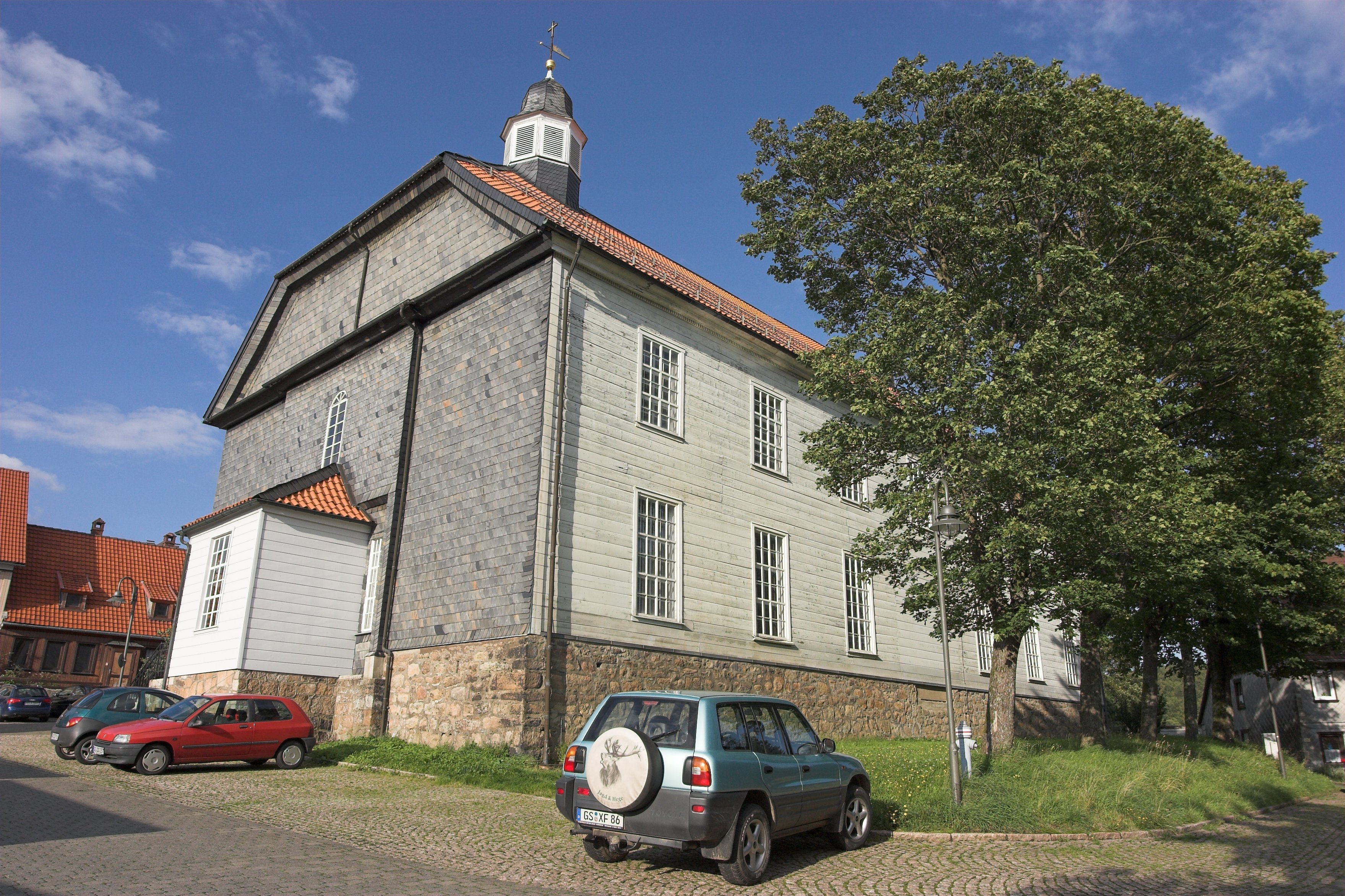 Evangelische Martini Kirche in Sankt Andreasberg